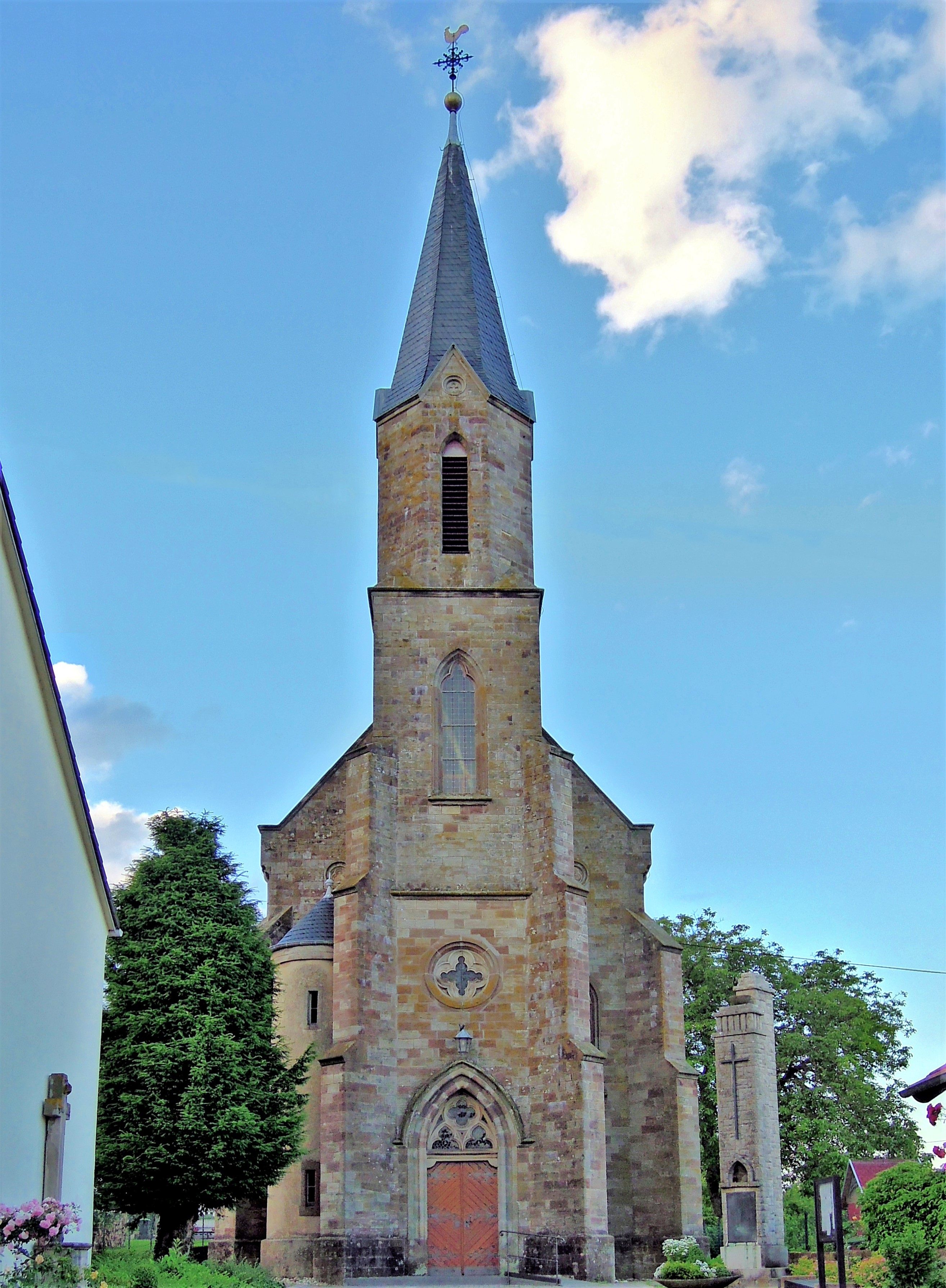 Rehlinger Straße, kath. Filialkirche St. Margareta mit Ausstattung, 1899–1900, Barockaltar 1769 (Einzeldenkmal)